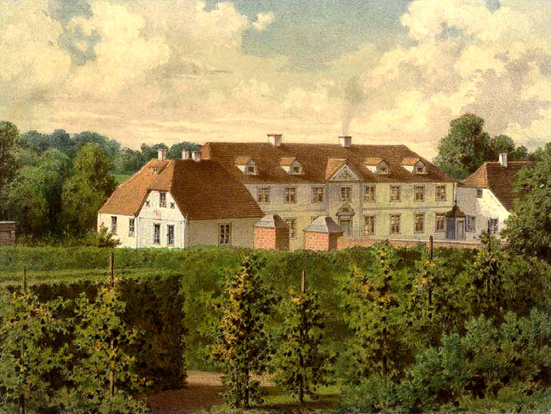 Schloss Kilgis, Kreis Preußisch Eylau